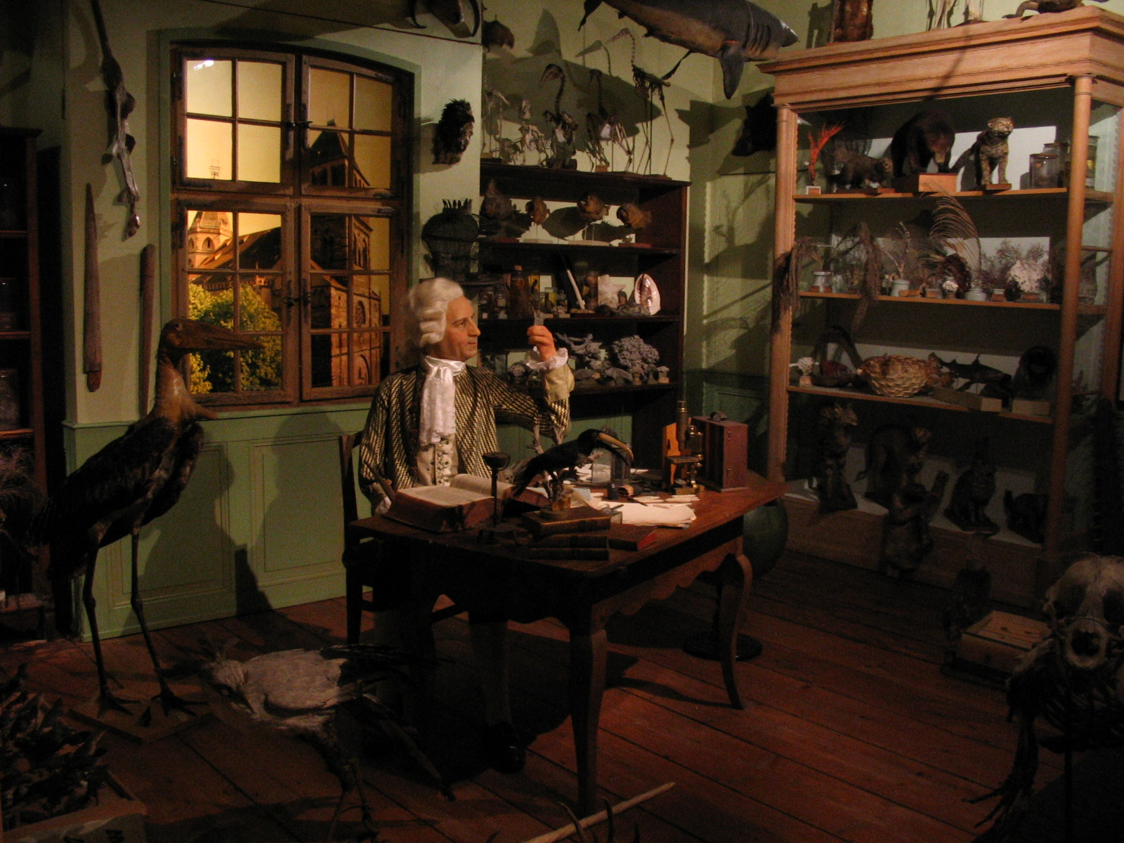 reconstitution du cabinet d'histoire naturelle du professeur Jean Hermann au musée zoologique de Strasbourg.